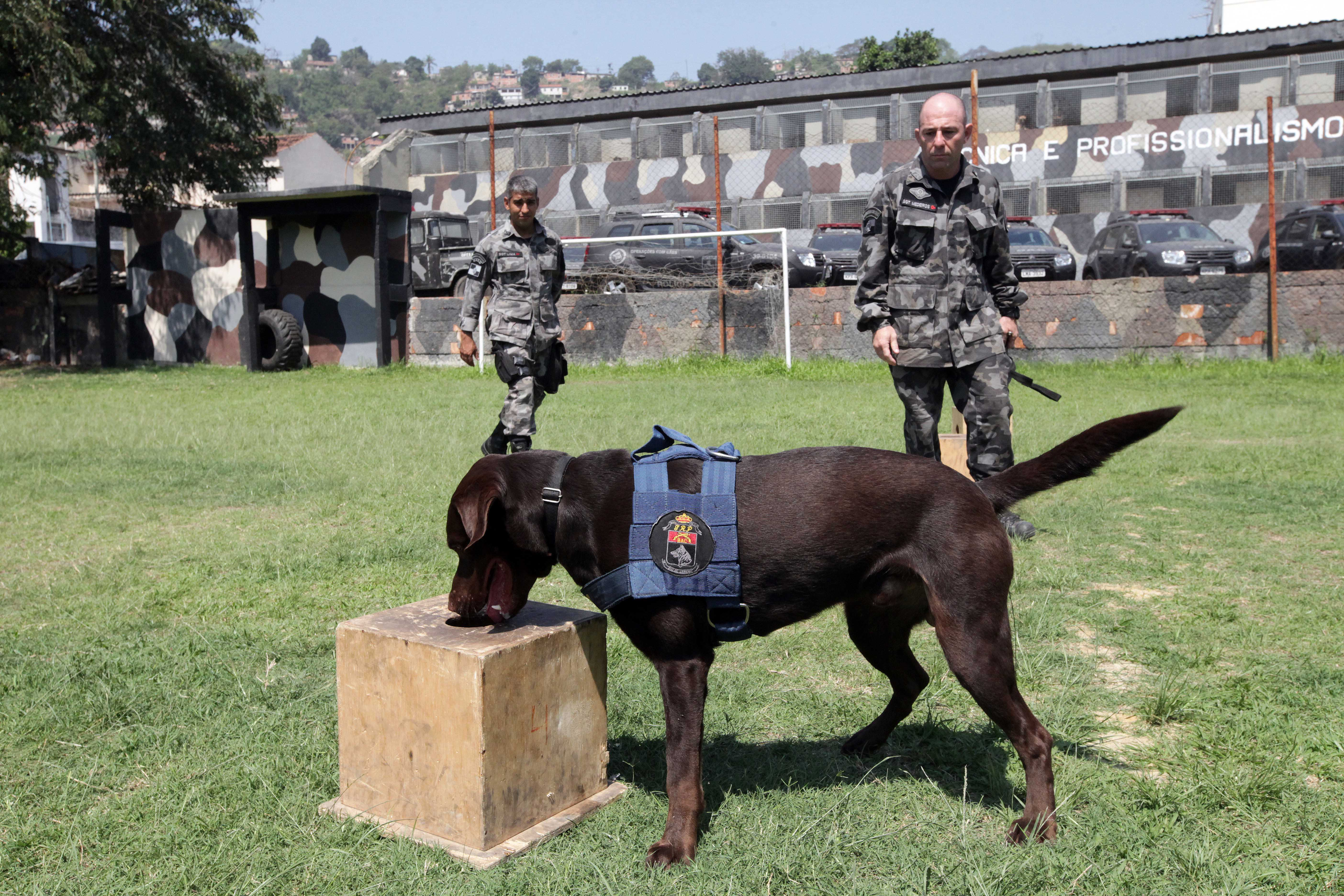 Cão do Batalhão de Ações com Cães do Comando de Operações Especiais (COE) da Polícia Militar do Estado de Janeiro treinando para farejar explosivos nas Olimpíadas de 2016.